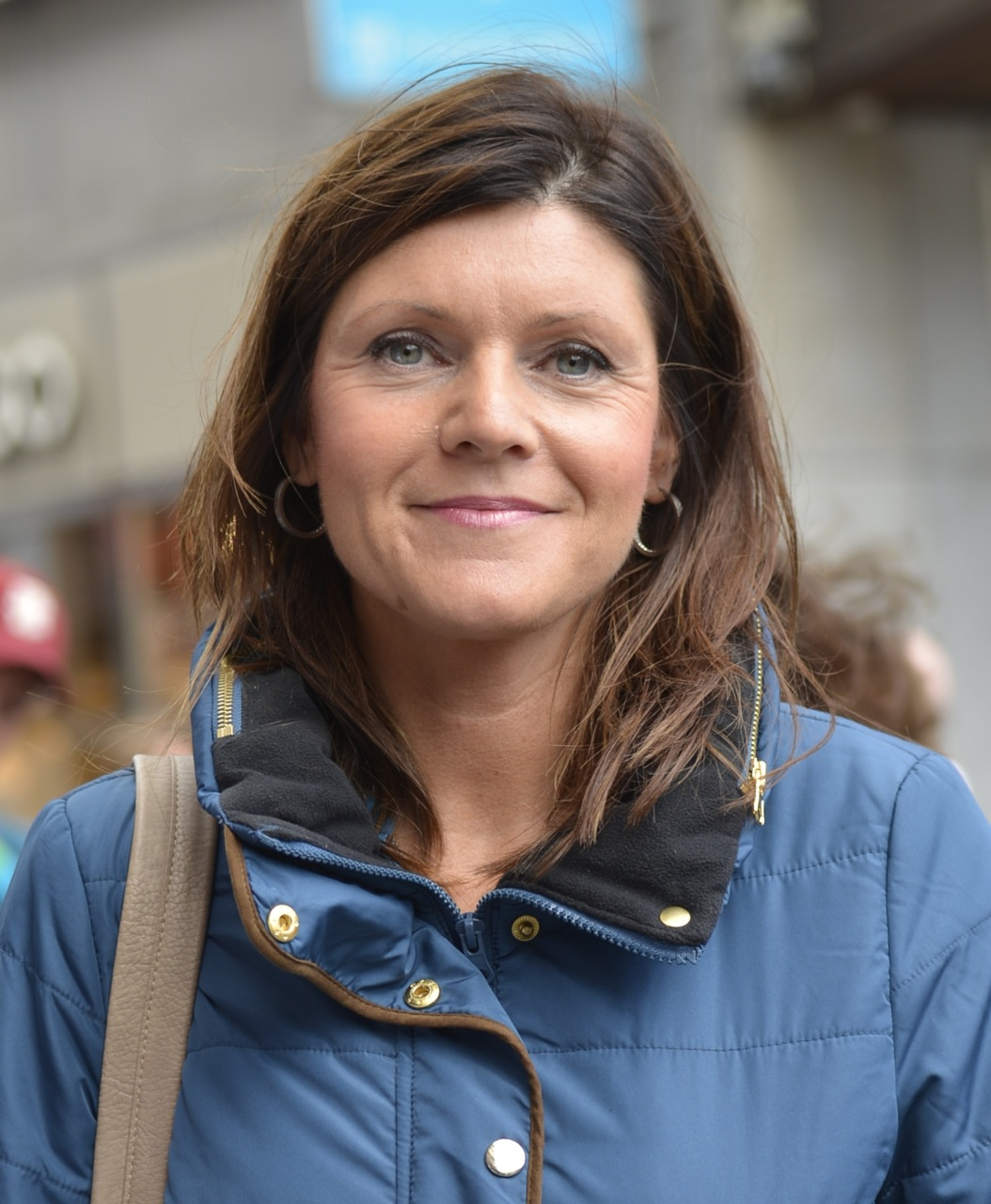 Eva Nordmark på Sergels torg i Stockholm den 9 september 2014.